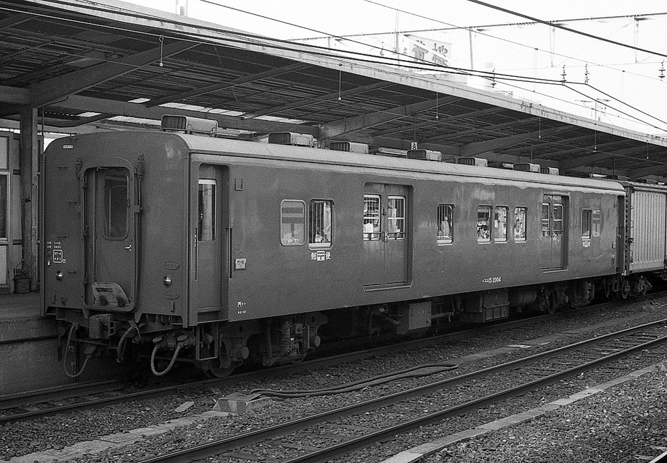 国鉄 スユ15 2004